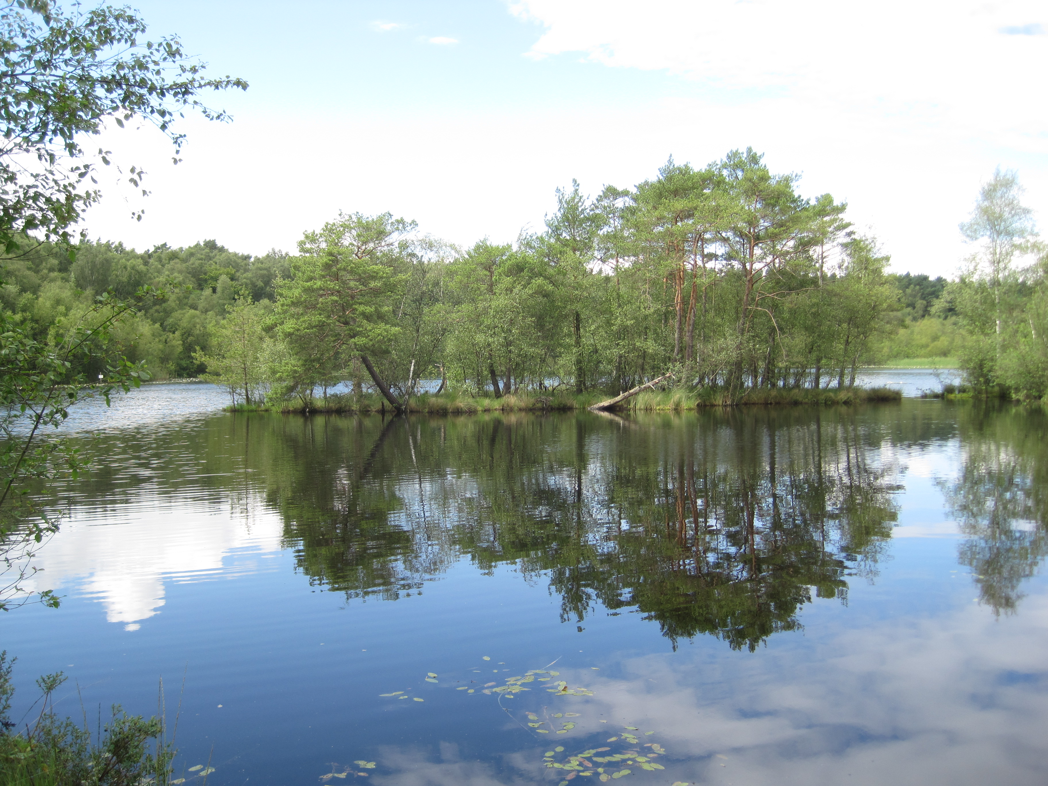 Blick ins Duvennester Moor von der schmalen Landzunge aus.